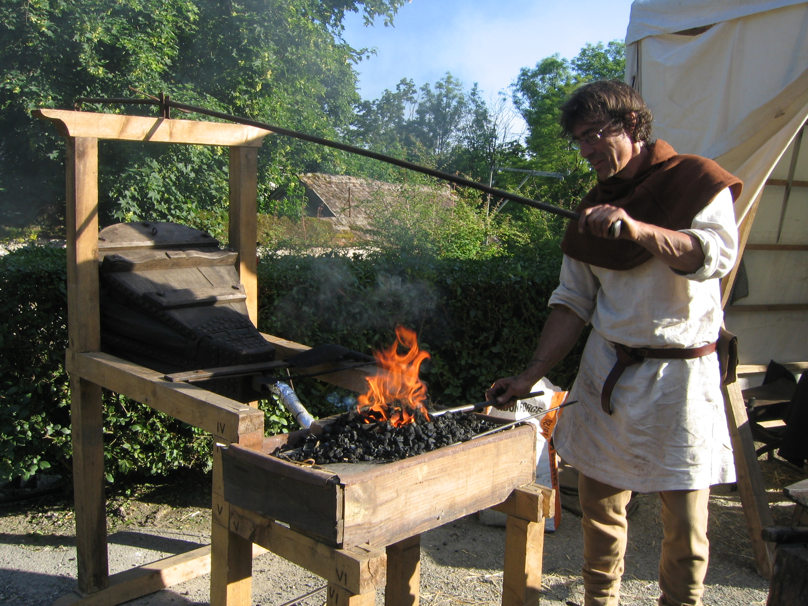 Un forgeron lors de la fête médiévale de Provins